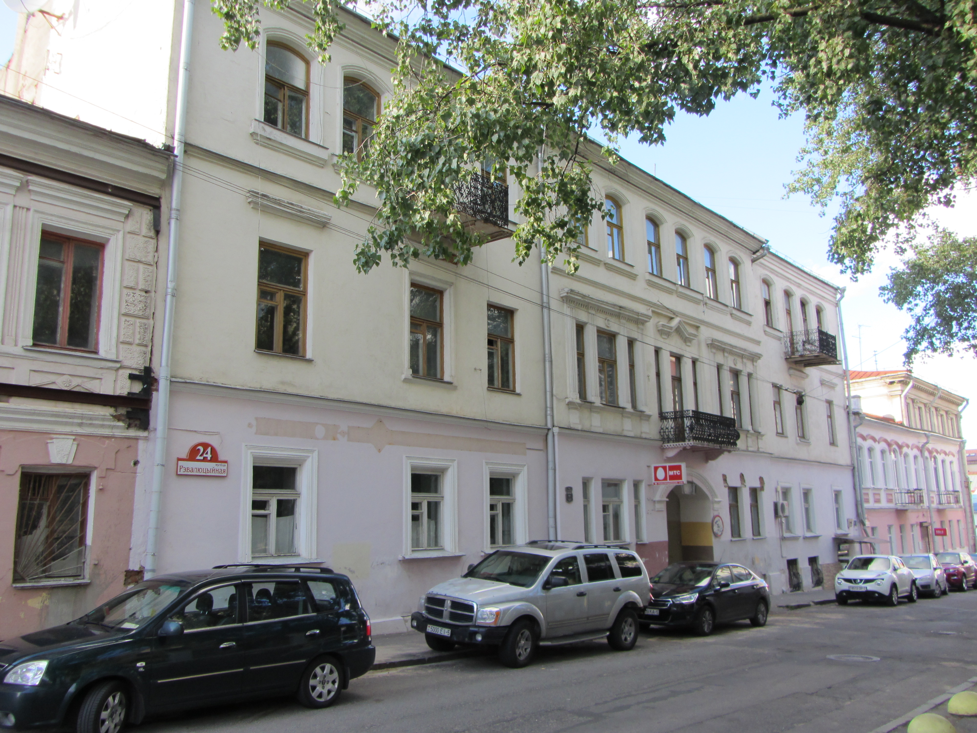 Беларуская (тарашкевіца): Вуліца Рэвалюцыйная, 24